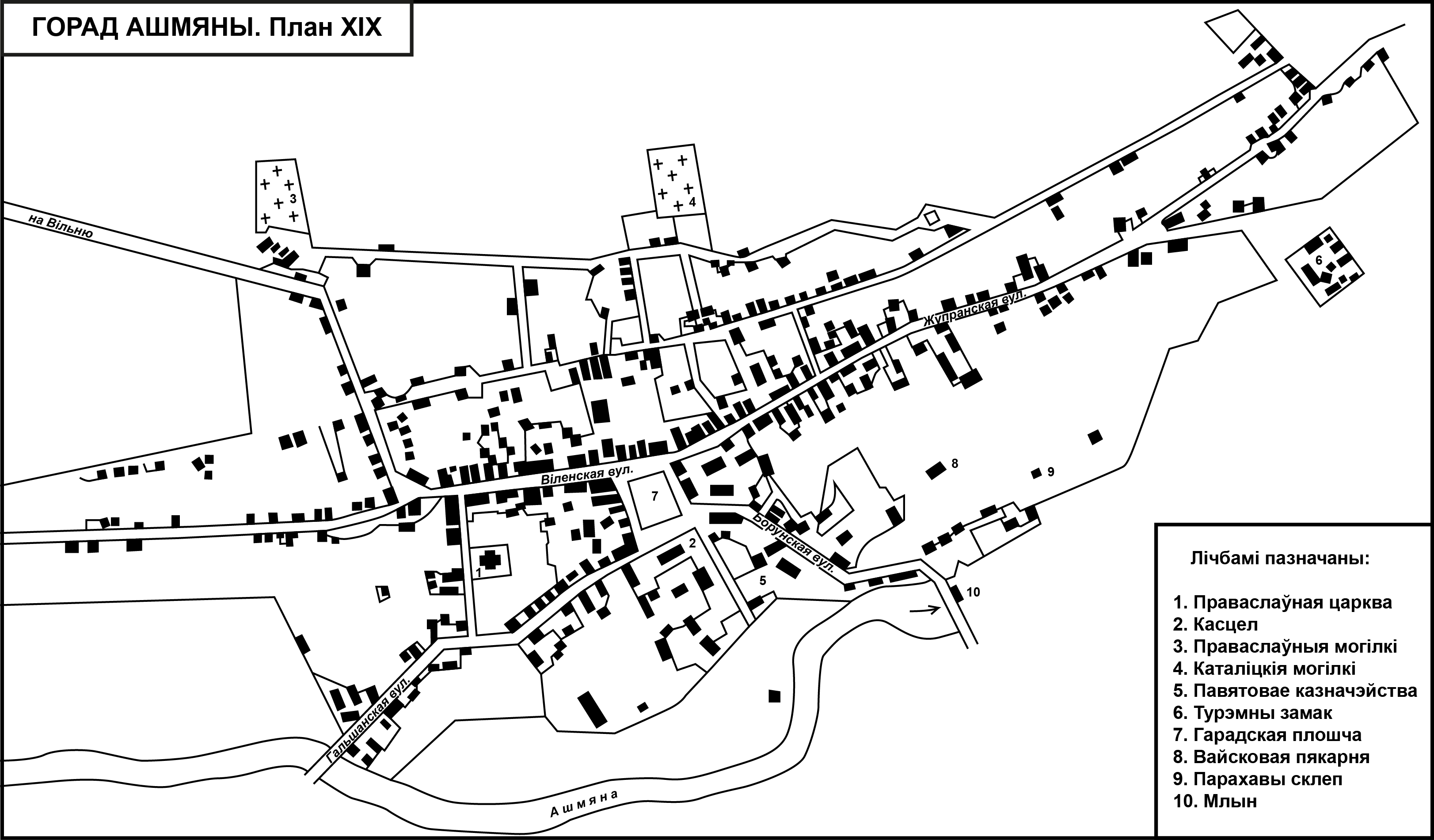 План города Ошмяны середины XIX в.